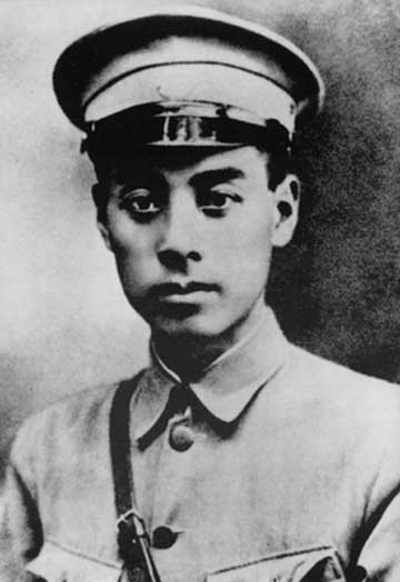 (( Description Zhou Enlai, Premier of China Date1924SourceFrom old photosAuthorAnonymousPermission (Reusing this file) PD licence according to Chinese law , See below )) Zhou Enlai, Premier of China